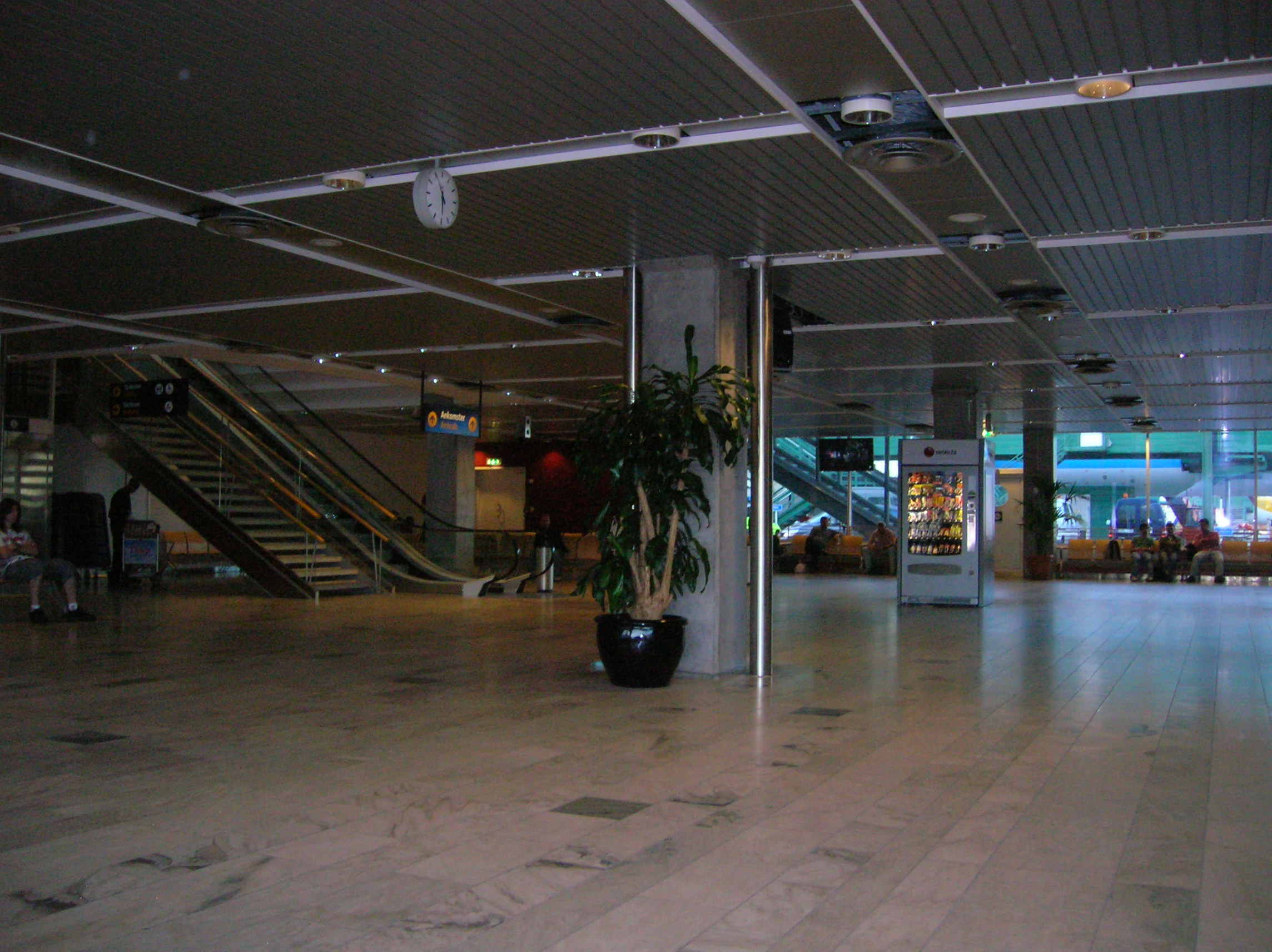 Aéroport de Göteborg-Landvetter (Suède) le 4 août 2007